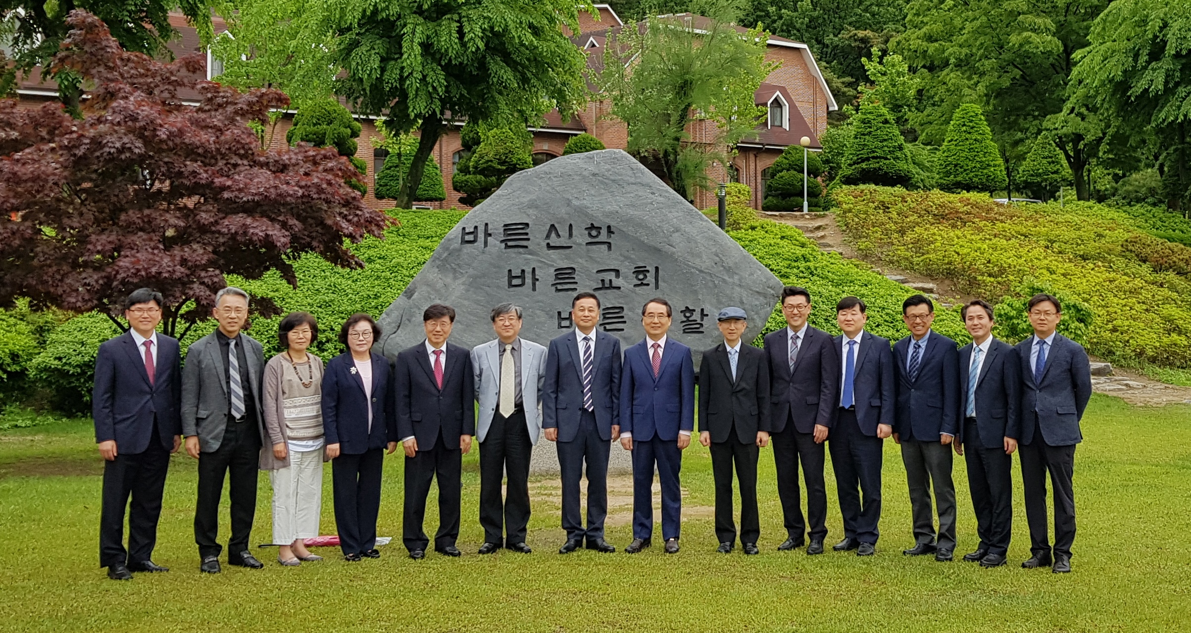 합동신학대학원 대학교 교수들 2018년 5월 17일